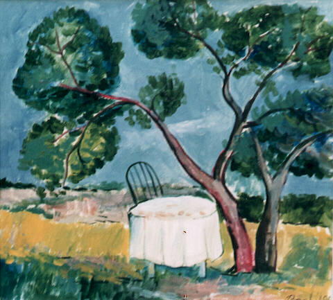 Schilderij door Mircea Bochis